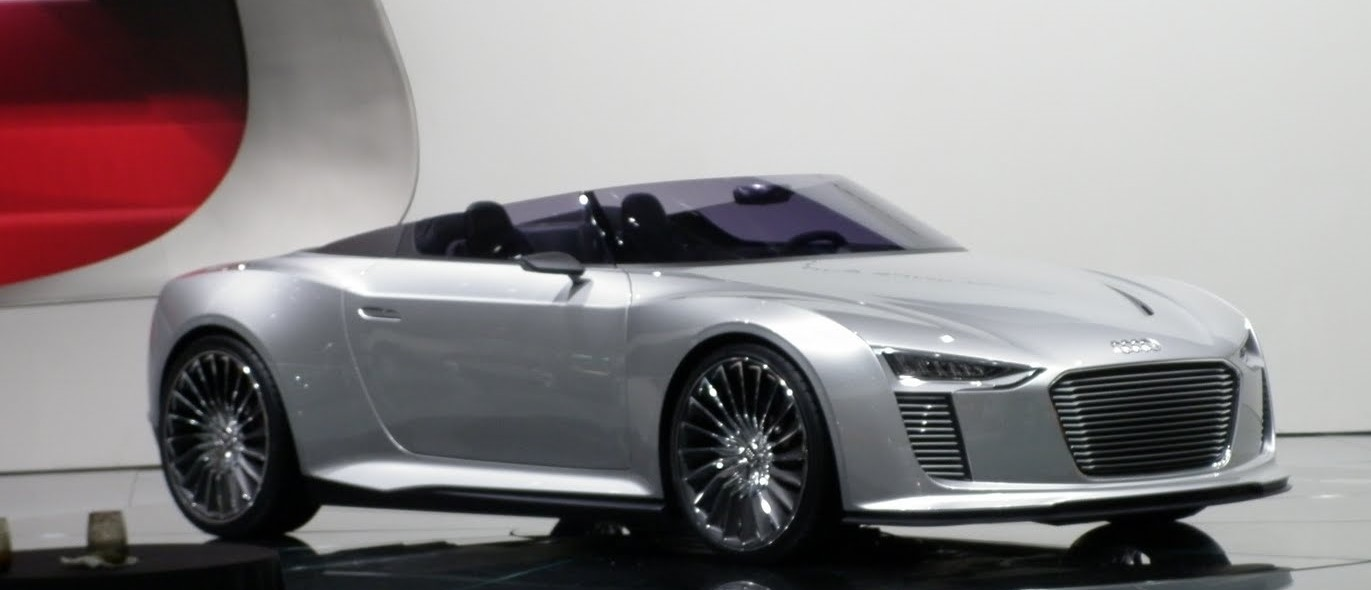 audi concept Paris 2010